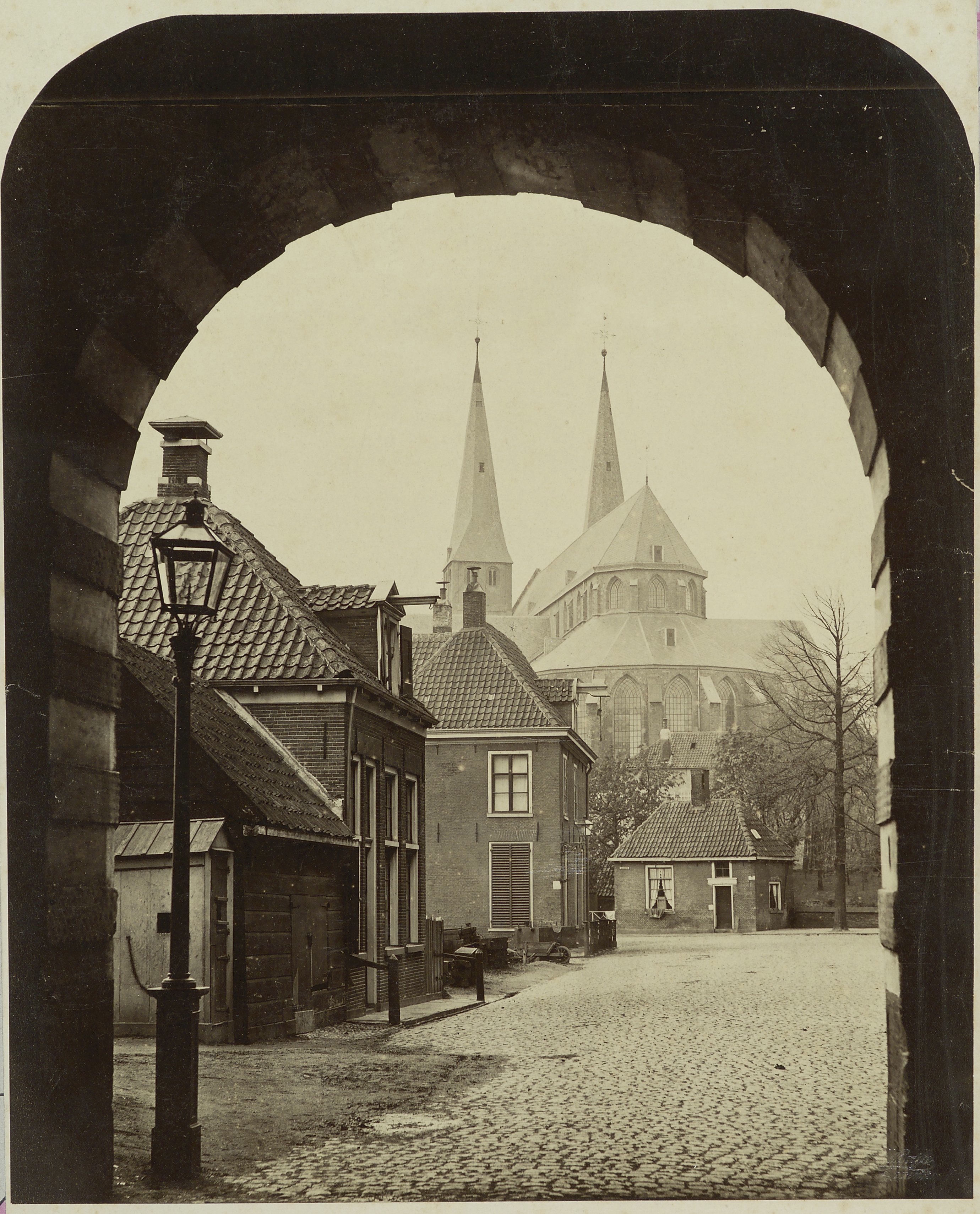 Bergkerk: Zicht vanuit het zuidoosten door de voormalige Bergpoort langs huizen op kerk (opmerking: Rechtsonder blindstempel: M. Bosse Deventer)